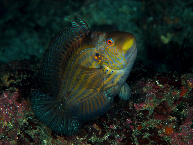 オハグロベラ Pteragogus aurigarius